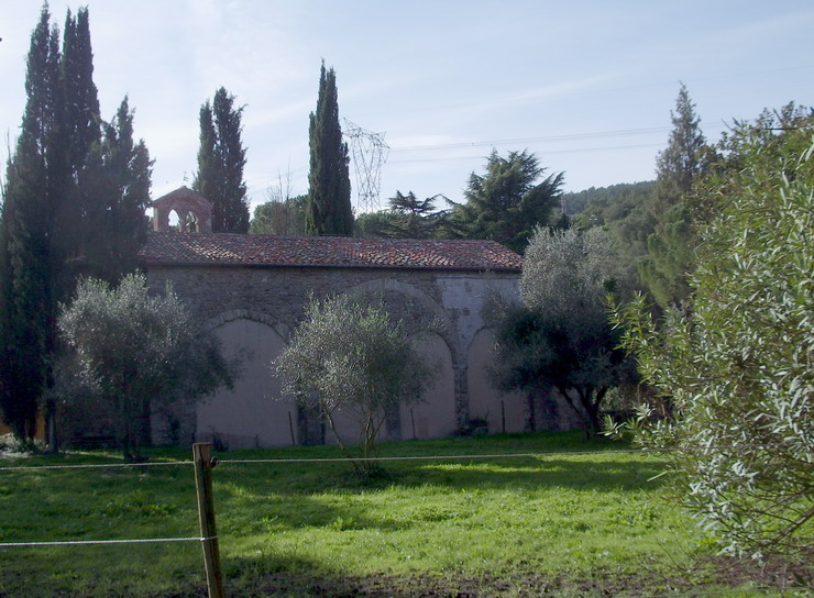 Fianco laterale sinistro dell'Abbazia di San Lorenzo al Lanzo (GR)